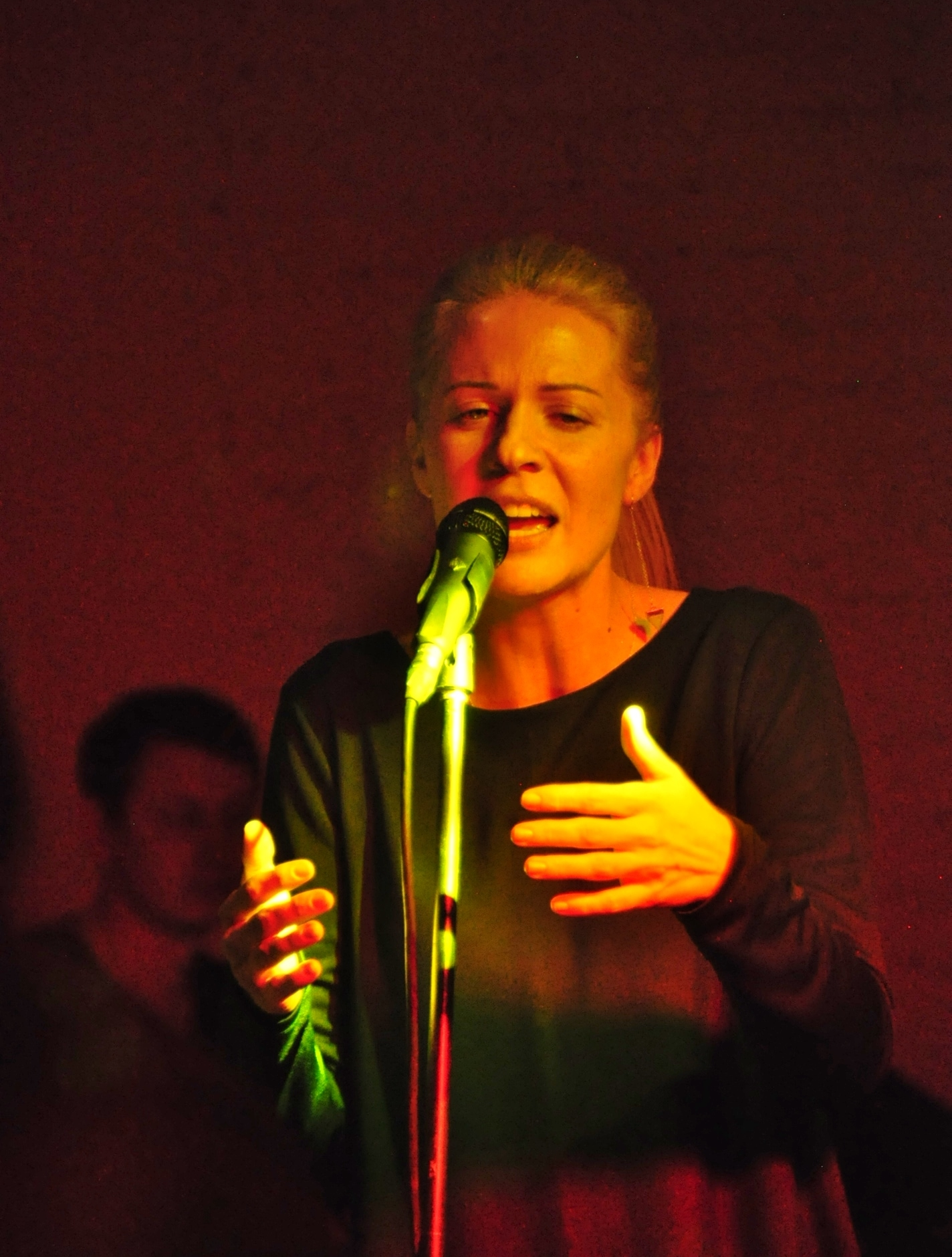 Американсько-українська співачка Брія Блессінґ на аукціоні картин, намальованих дітьми Навчально-реабілітаційного центру «Джерело» у Львові, квітень 2017